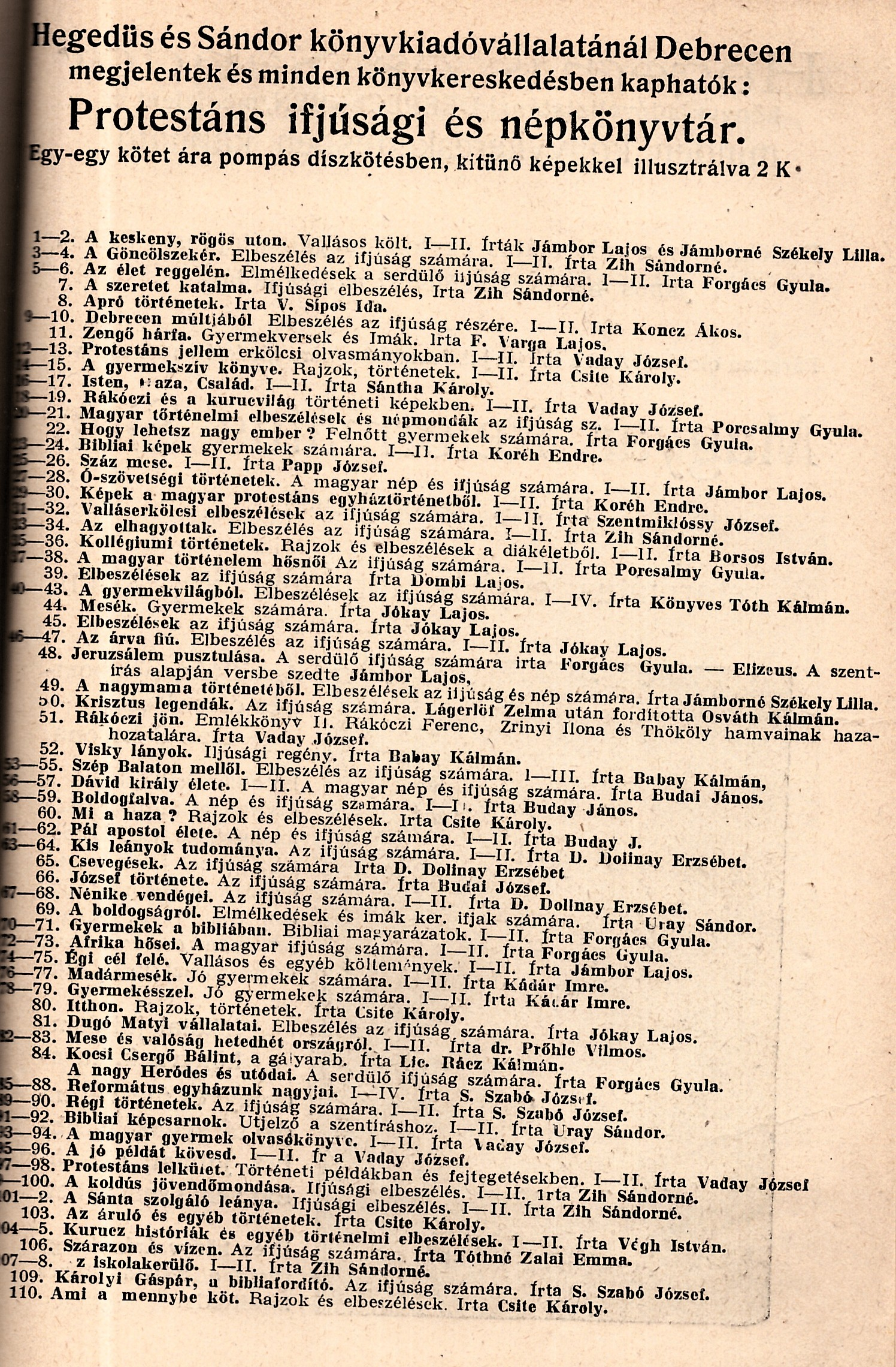 Protestáns ifjúsági és népkönyvtár hirdetése IN: Murányi János: Bibliai szemelvények könyve (1913)